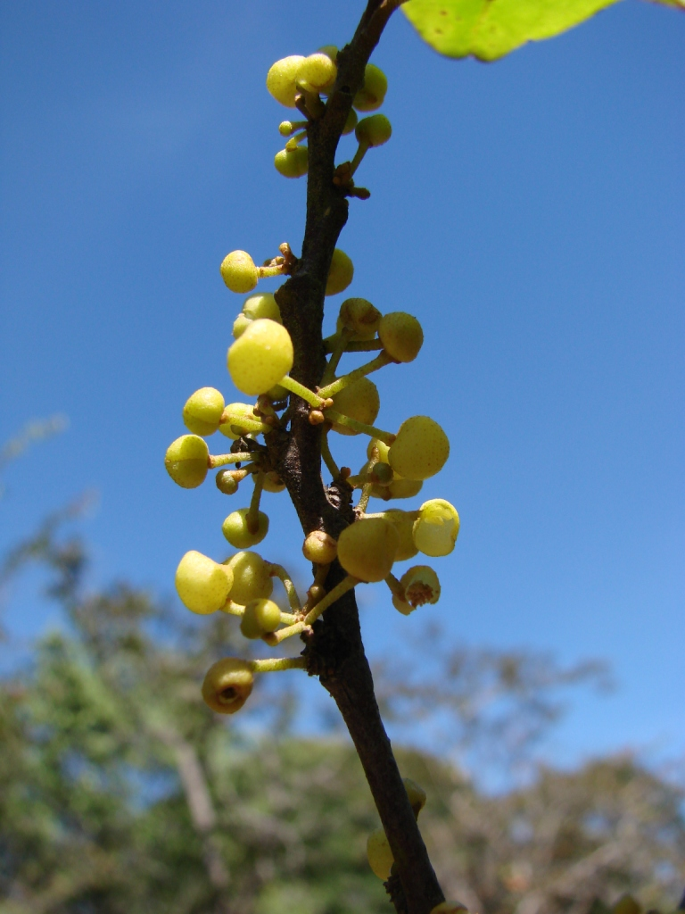 Pera glabrata - EUPHORBIACEAE Jardim Botânico de Brasília - Distrito Federal - Brasil.